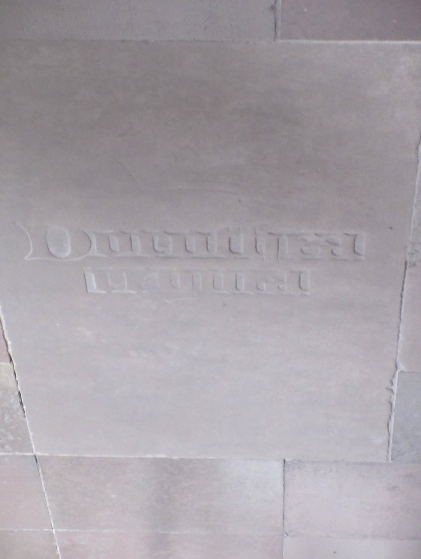 Dronning Dorothea af Brandenburg blev begravet i Roskilde Domkirke ved siden af sin anden ægtefælle kong Christian I. Graven er blot dækket af en enkelt ligsten med en kort indskrift.